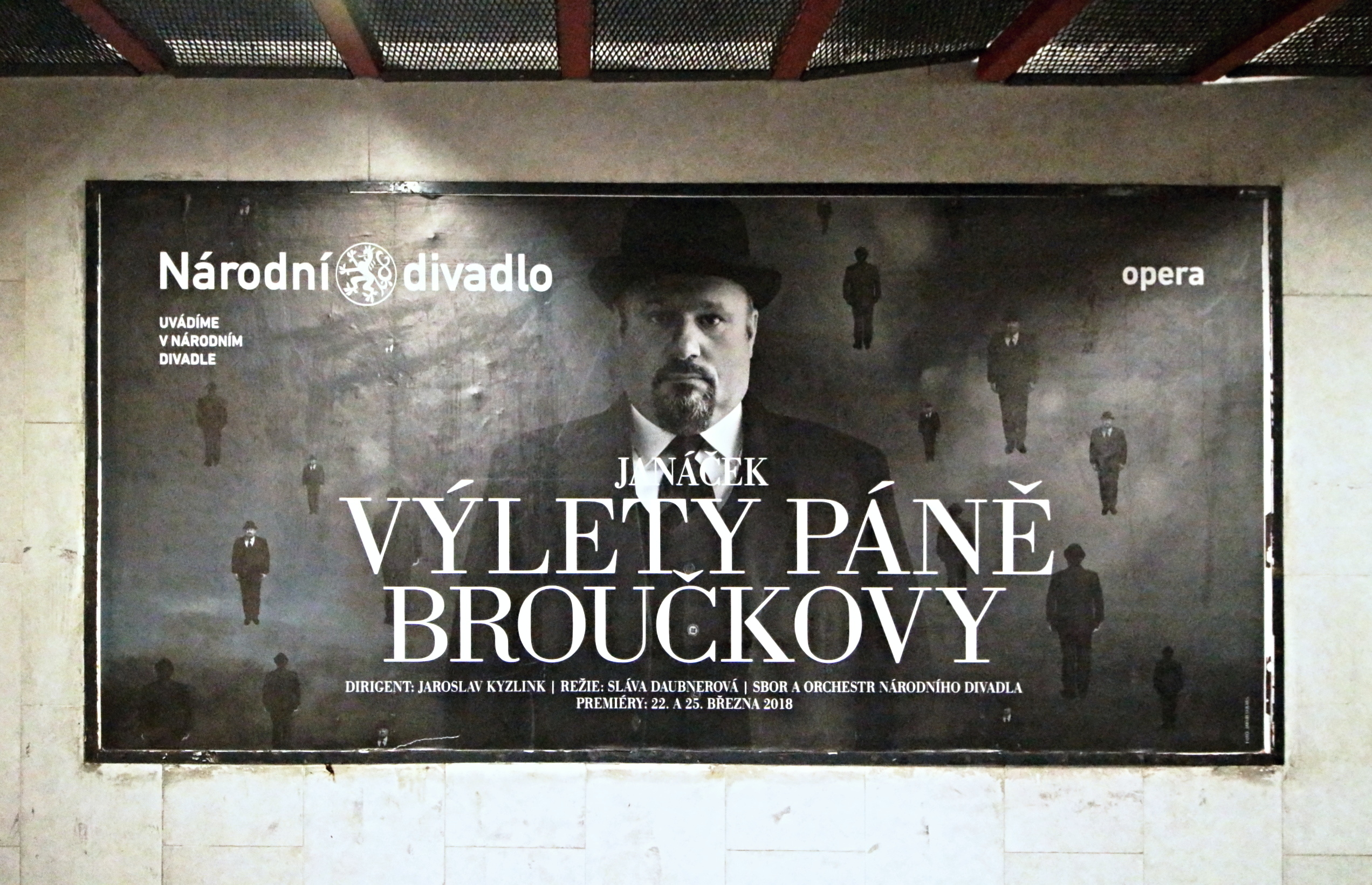 Plakát ND, Leoš Janáček: Výlety páně Broučkovy